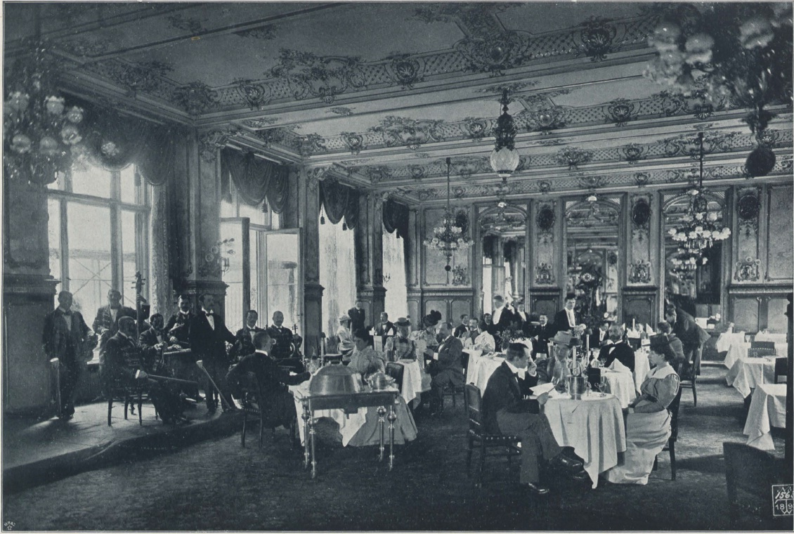 Ansicht des Speisesaals des ehemaligen Berliner Hotels "Der Reichshof", um 1898.